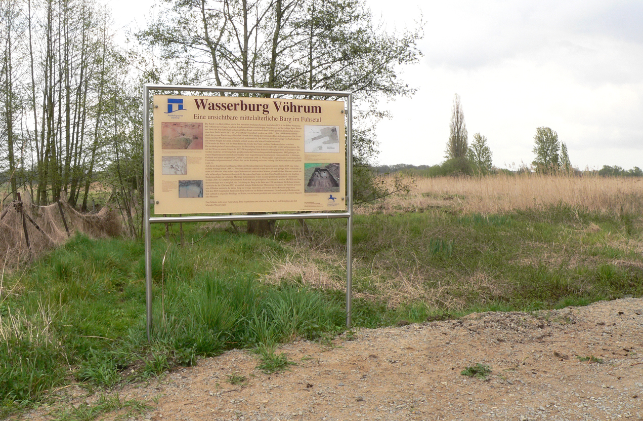 Infotafel an der Wasserburg Vöhrum